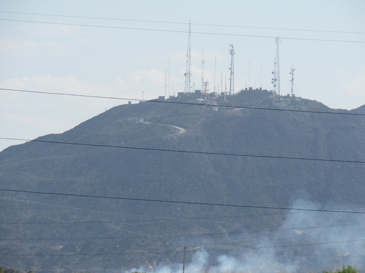 Desde el acceso sur de Michoacán de Ocampo, B. C. se toma este acercamiento hacia la cara este de Cerro Prieto y sus multiples antenas instaladas que aprovechan su condición de otero.